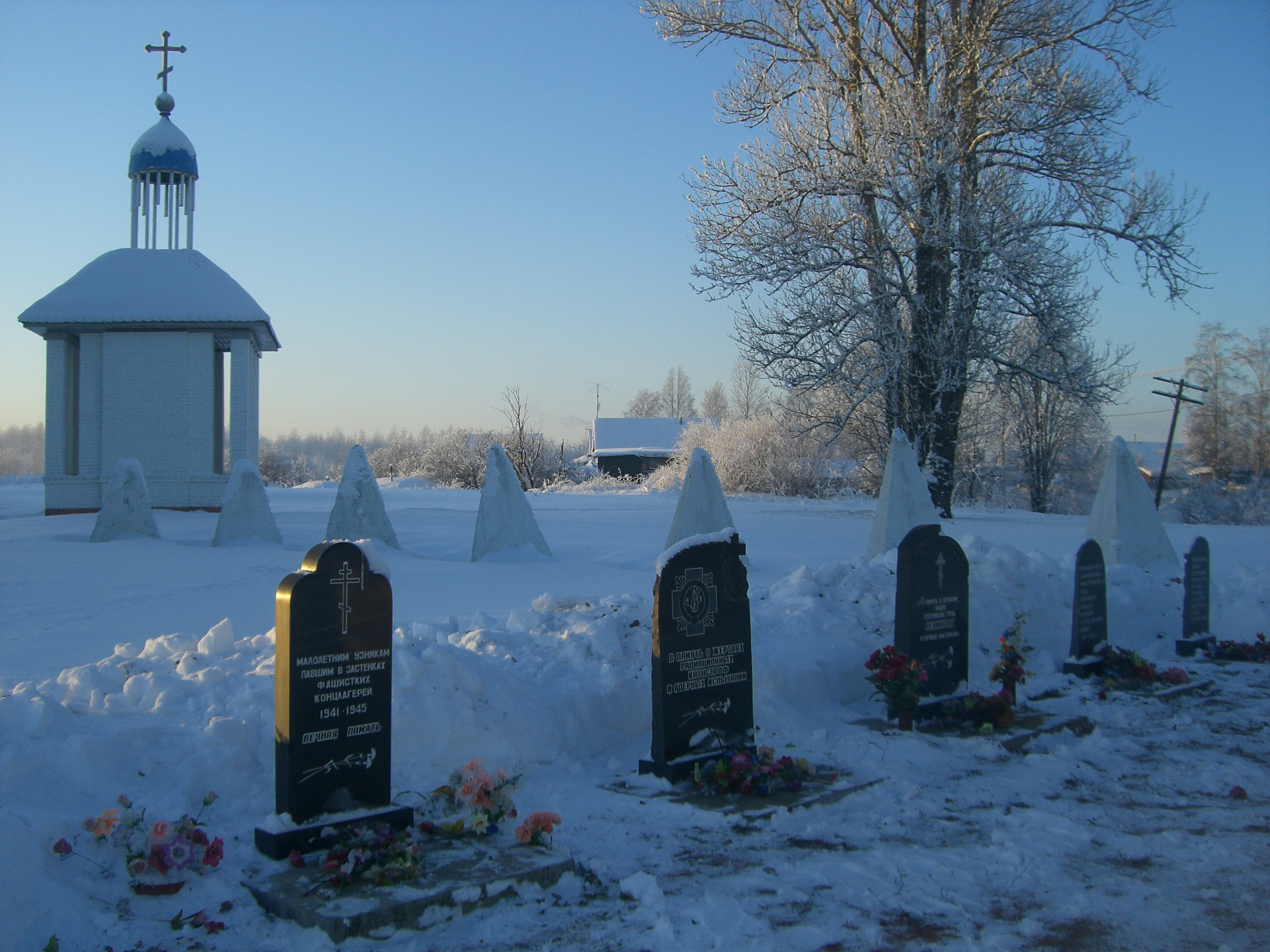 Мемориал "Невский порог". Надгробия, часовня, надолбы.